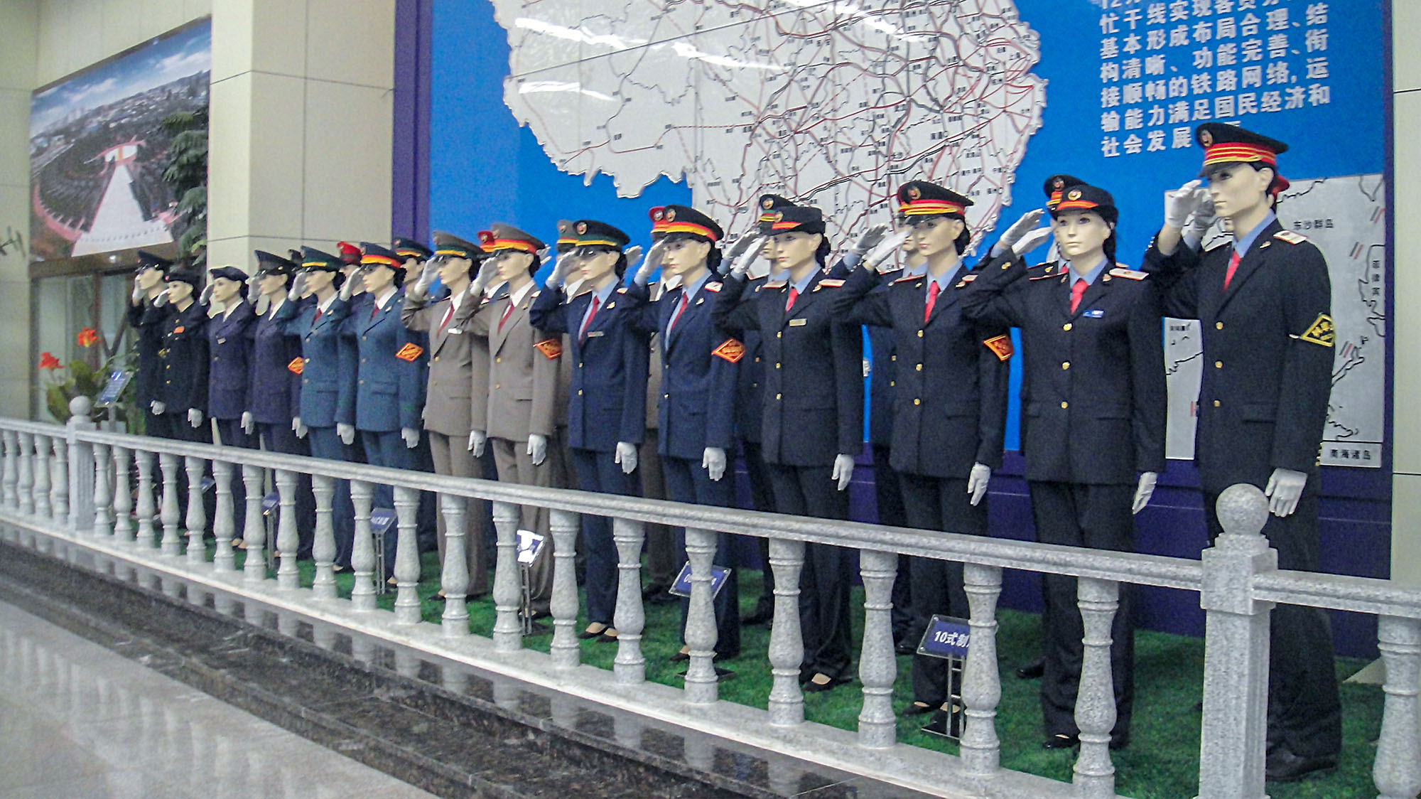 不同时期的中国铁路制服，展出于沈阳铁路陈列馆